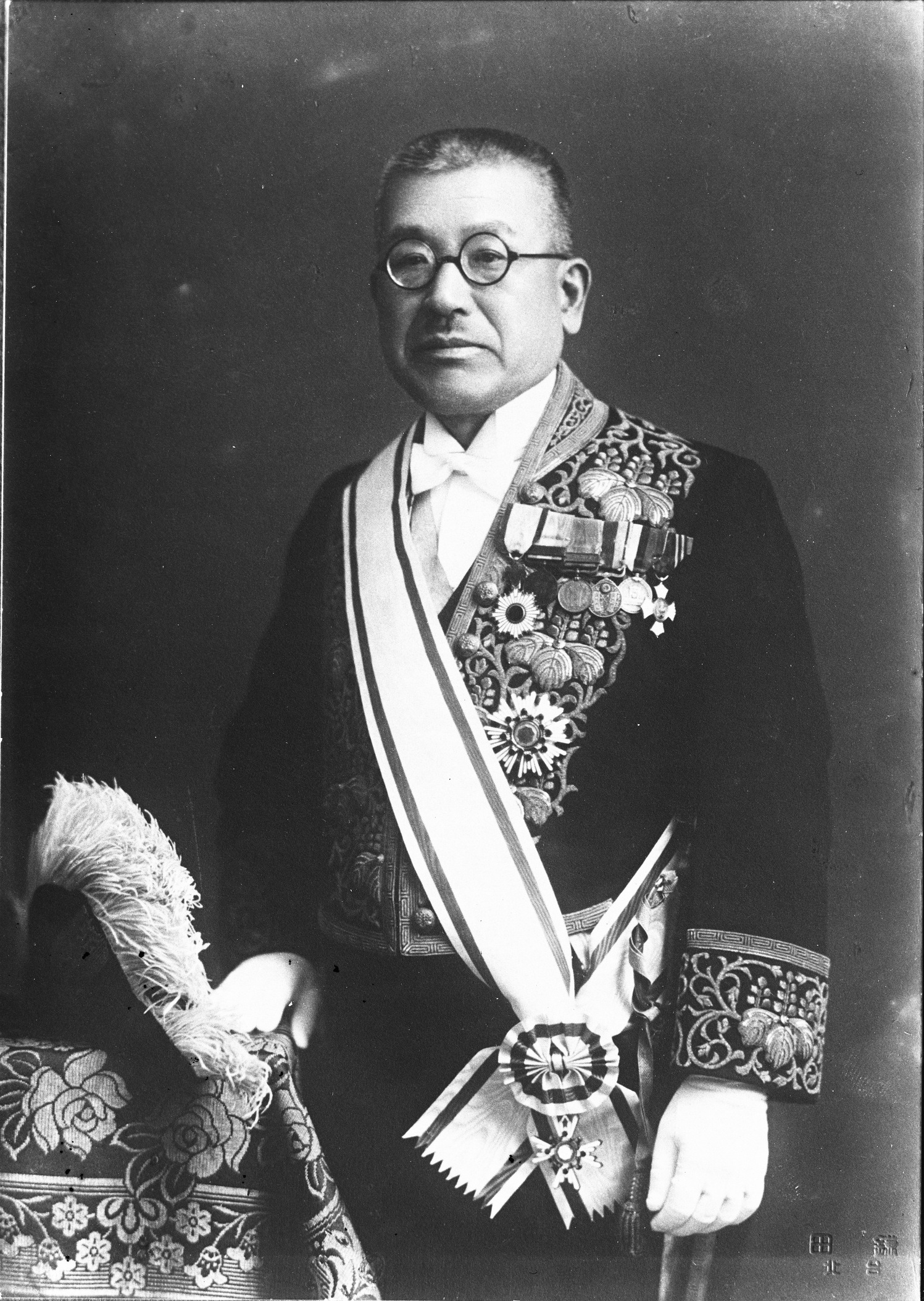 臺灣總督府某相關人物肖像照。